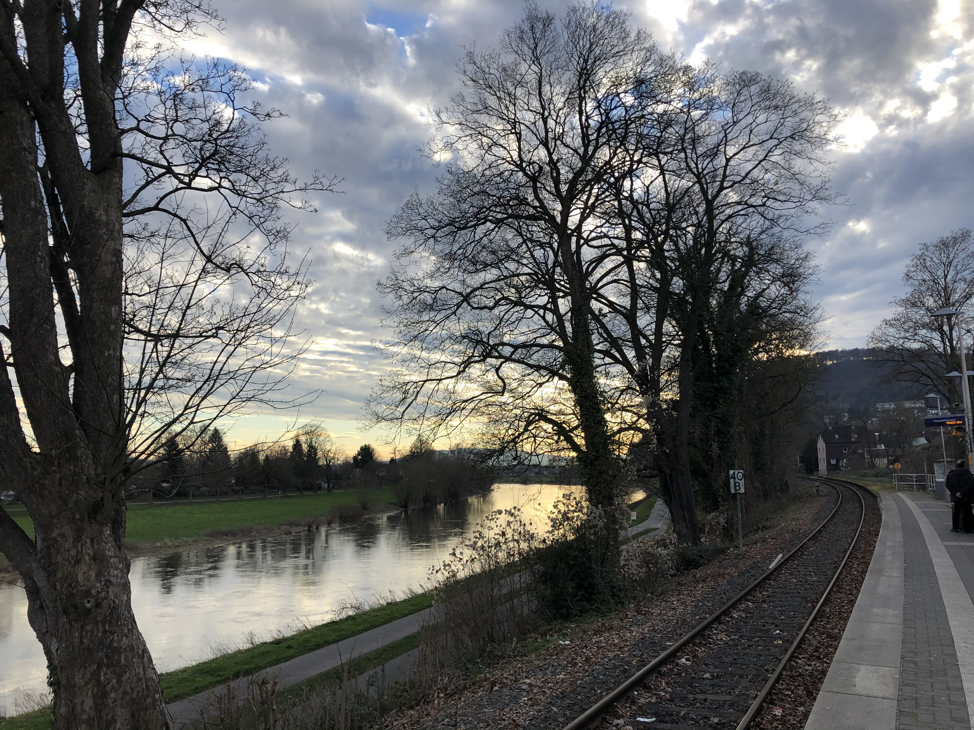 Weser, Weserradweg "R99", Haltestelle "Höxter Rathaus"